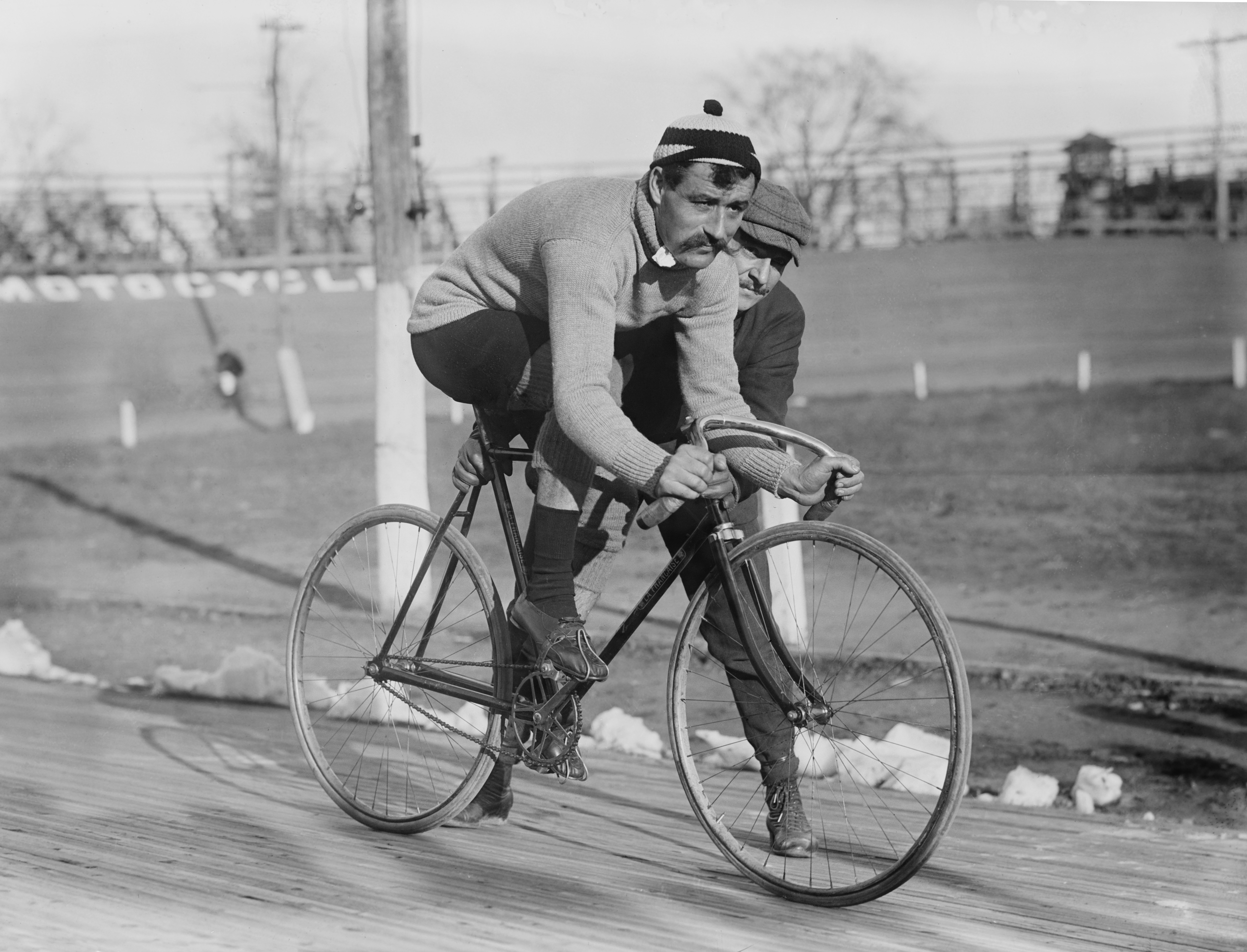 Cyclist Léon Georget in 1909.